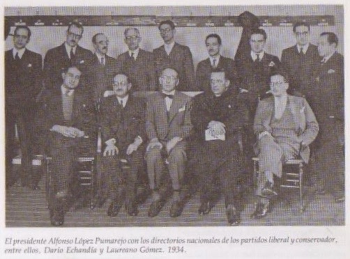 El Presidente de Colombia Alfonso López Pumarejo y los miembros de los directorios liberal y conservador